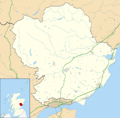 Clova in de Angus